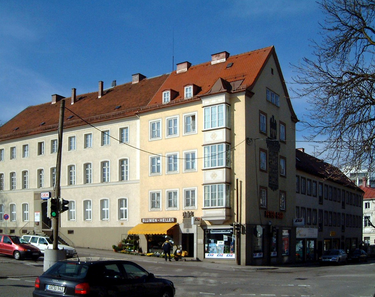 Ehemalige Drogerie Hold, Gebäude abgerissen, Kempten, August-Fischer-Platz vor 2003